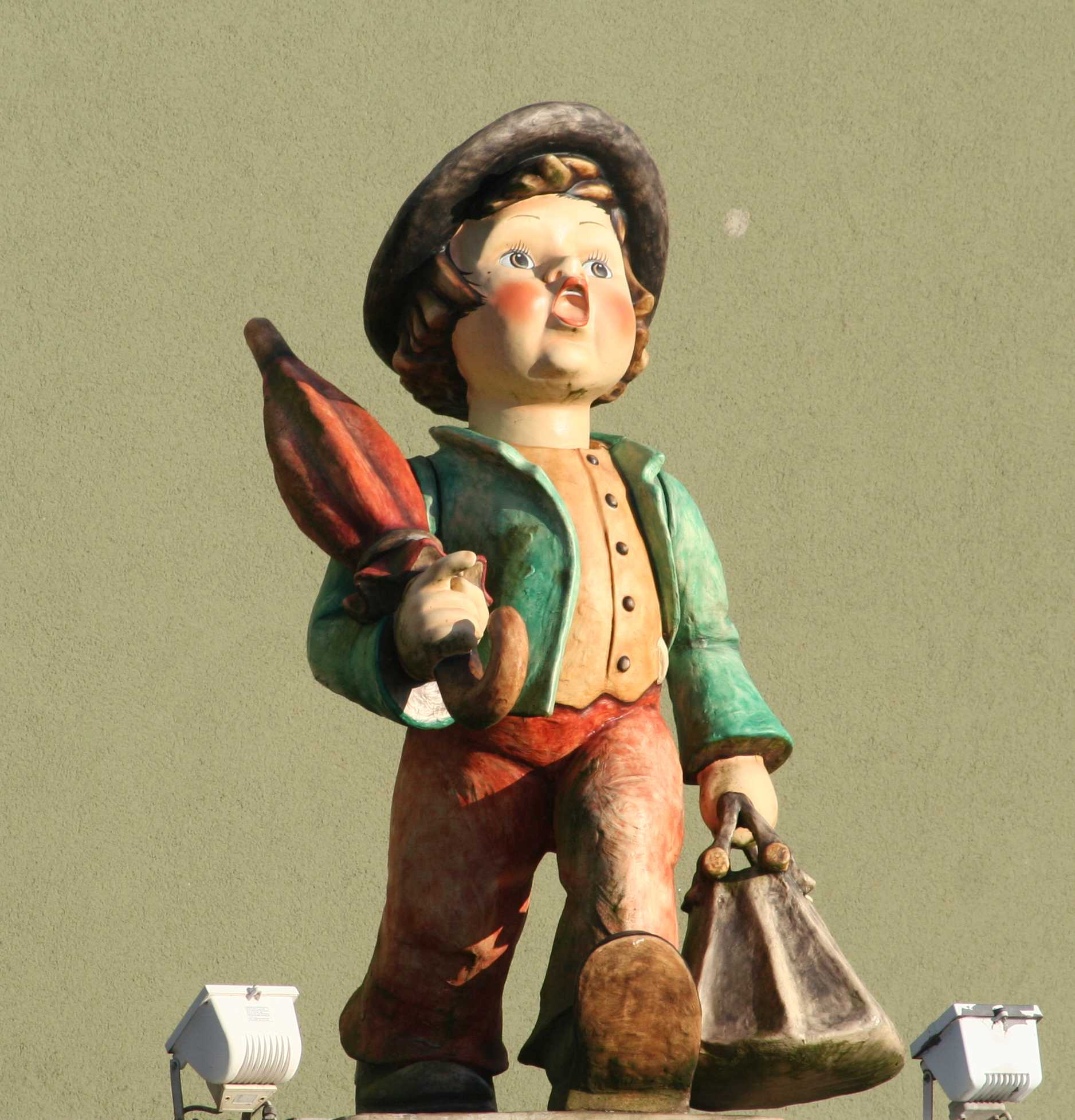 Hummelfigur, Porzellanfabrik W. Goebel in Rödental, Landkreis Coburg